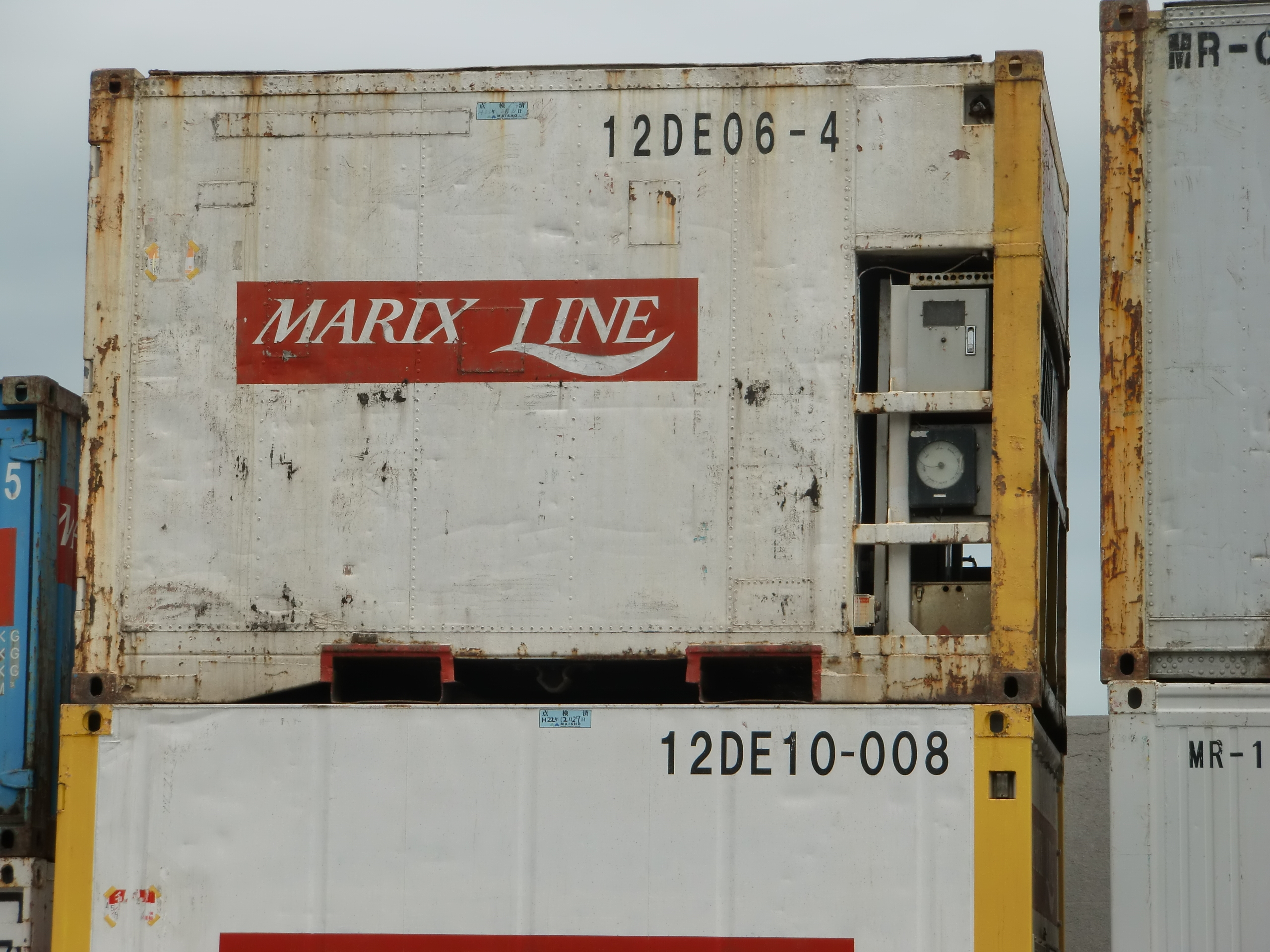 本土 ⇔ 沖縄・南九州離島地域で活躍する『 マリックスライン 』所有の内航専用、12ft型コンテナ。 ※ＪＲ貨物登録の旧、ＵＦ１３Ａ私有コンテナを再利用している。 【 鹿児島県／鹿児島新港 】